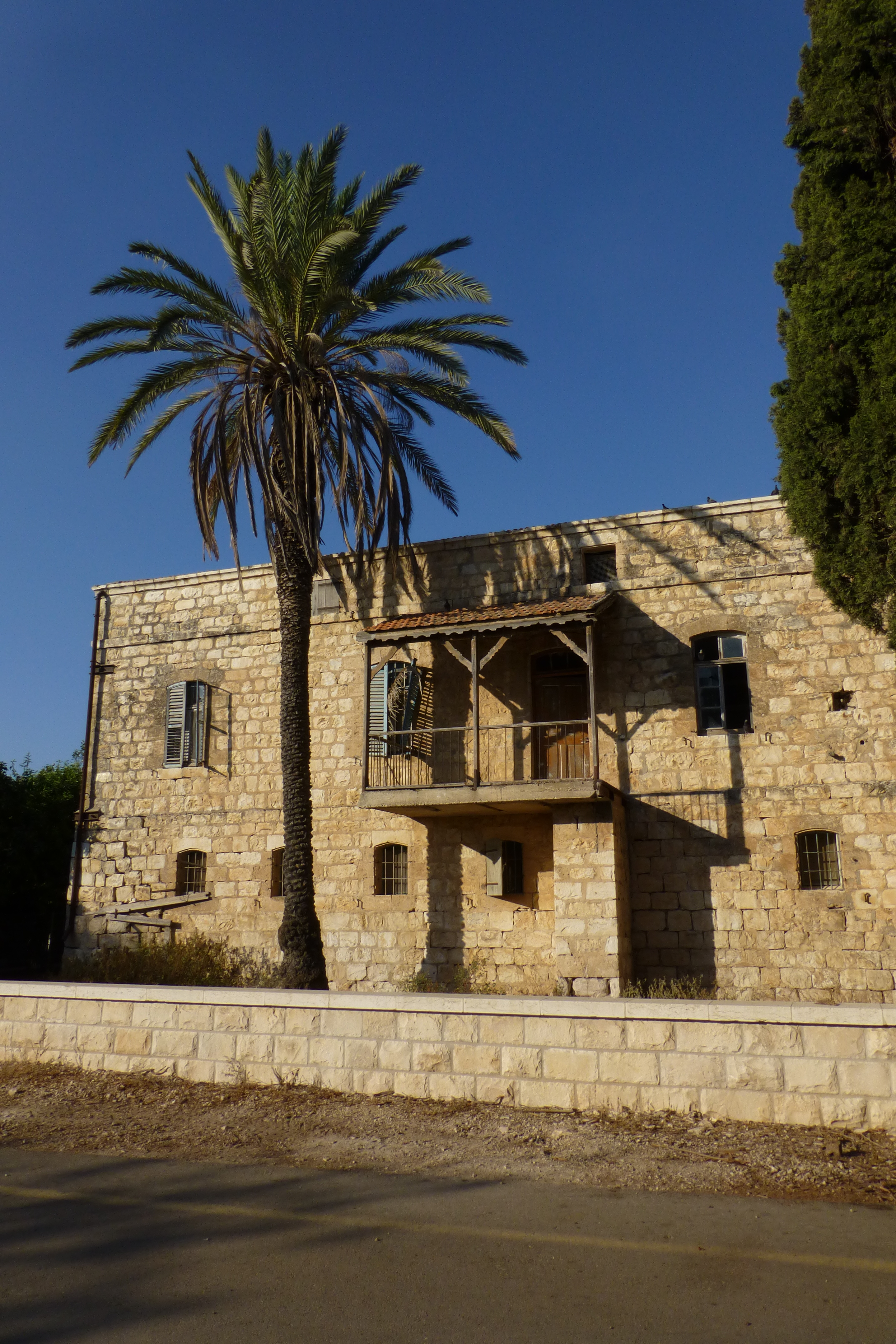 ראשוני המתיישבים באתר היישוב אלוני אבא היו בני הדור השני של תנועת הטמפלרים הגרמנים, אשר הקימו במקום בשנת 1907 מושבה חקלאית קטנה ושמה "ולדהיים".